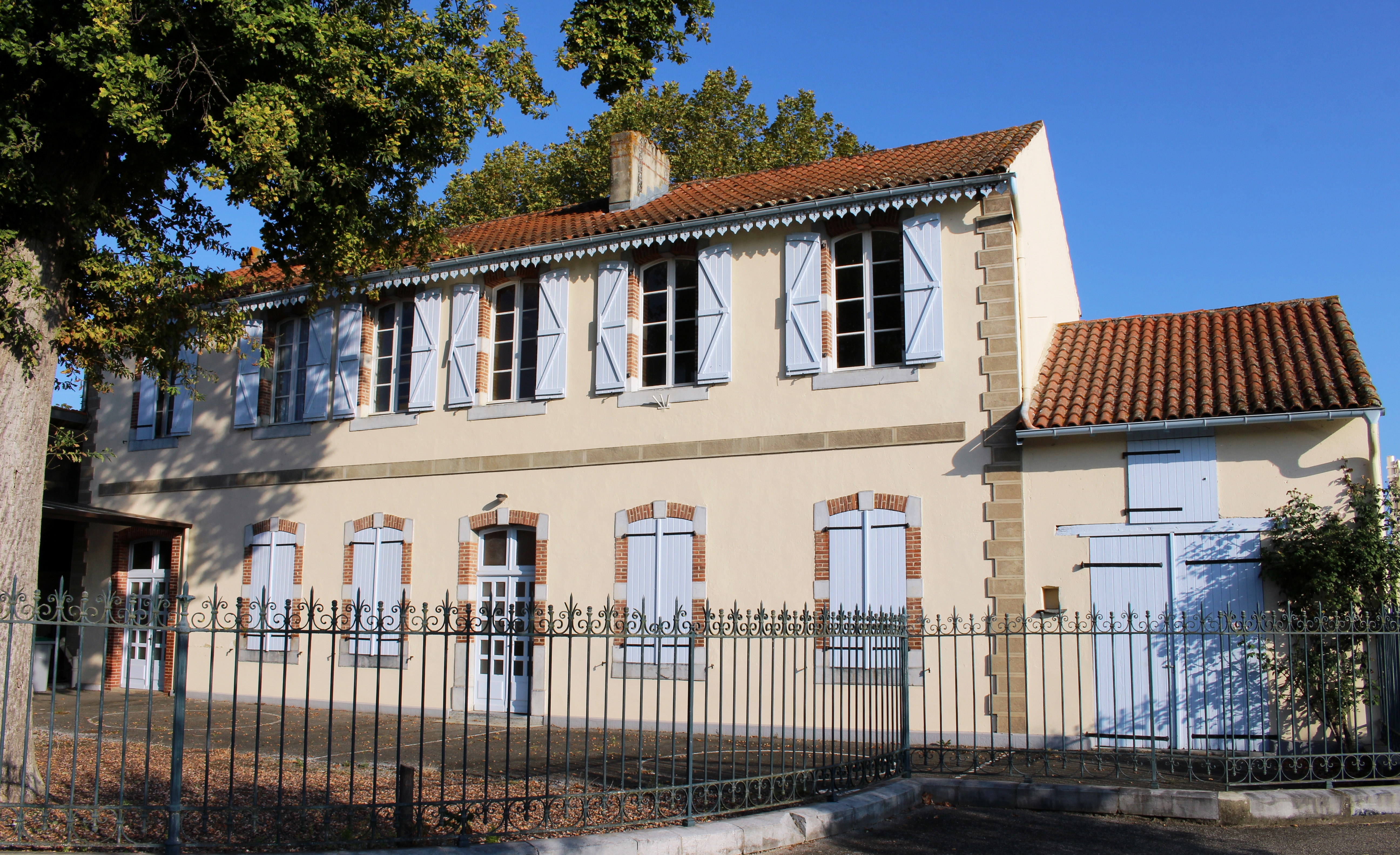 École de Nouilhan (Hautes-Pyrénées)